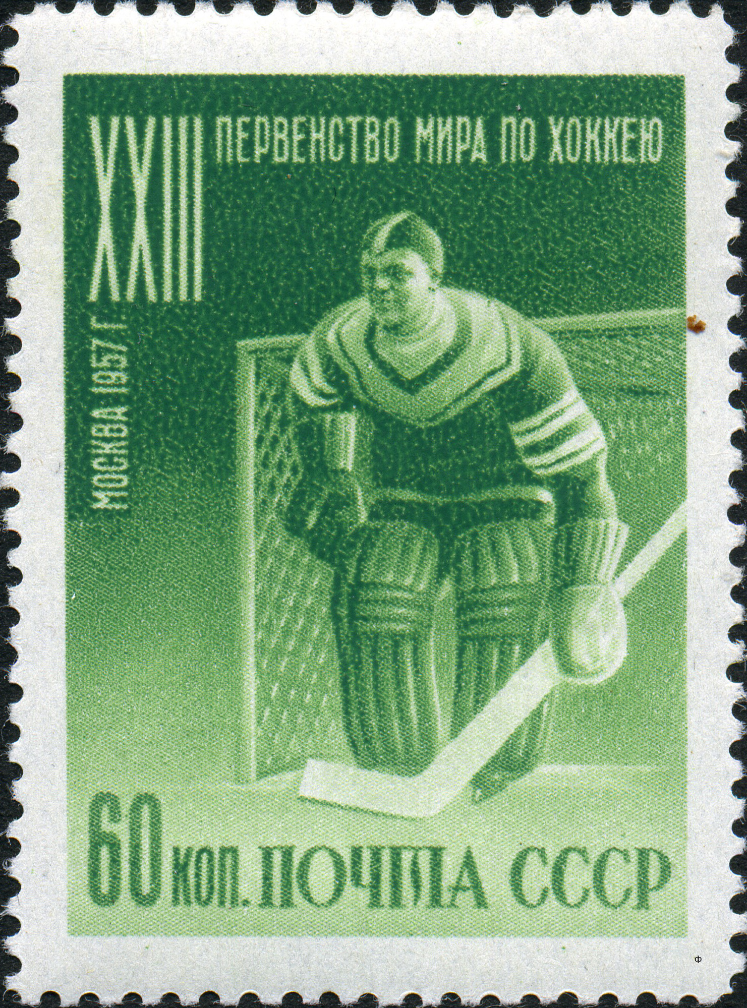 Марка СССР